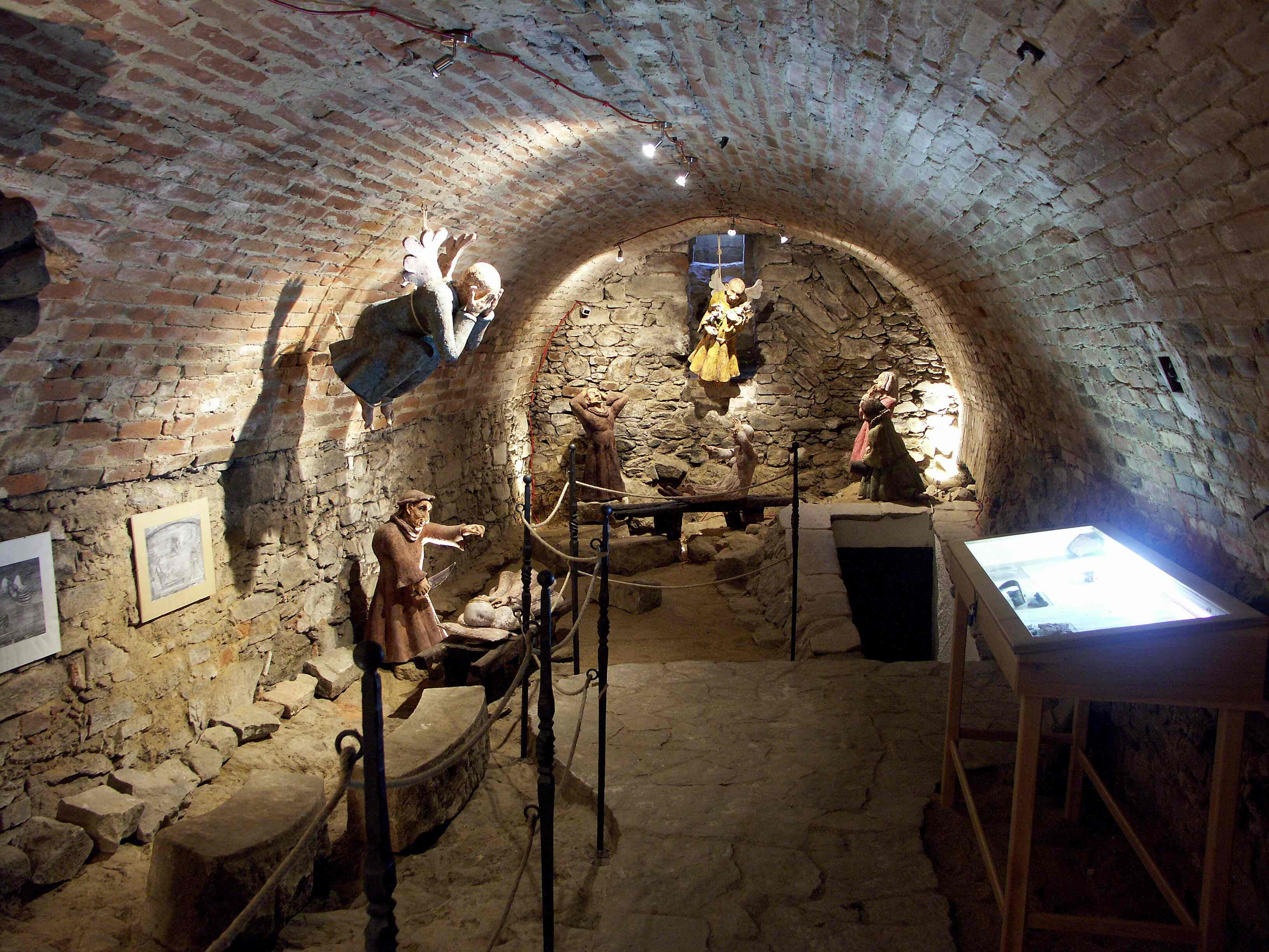 Stálá expozice "Historie a legendy z Telče a okolí" je instalována v románském sklepení.